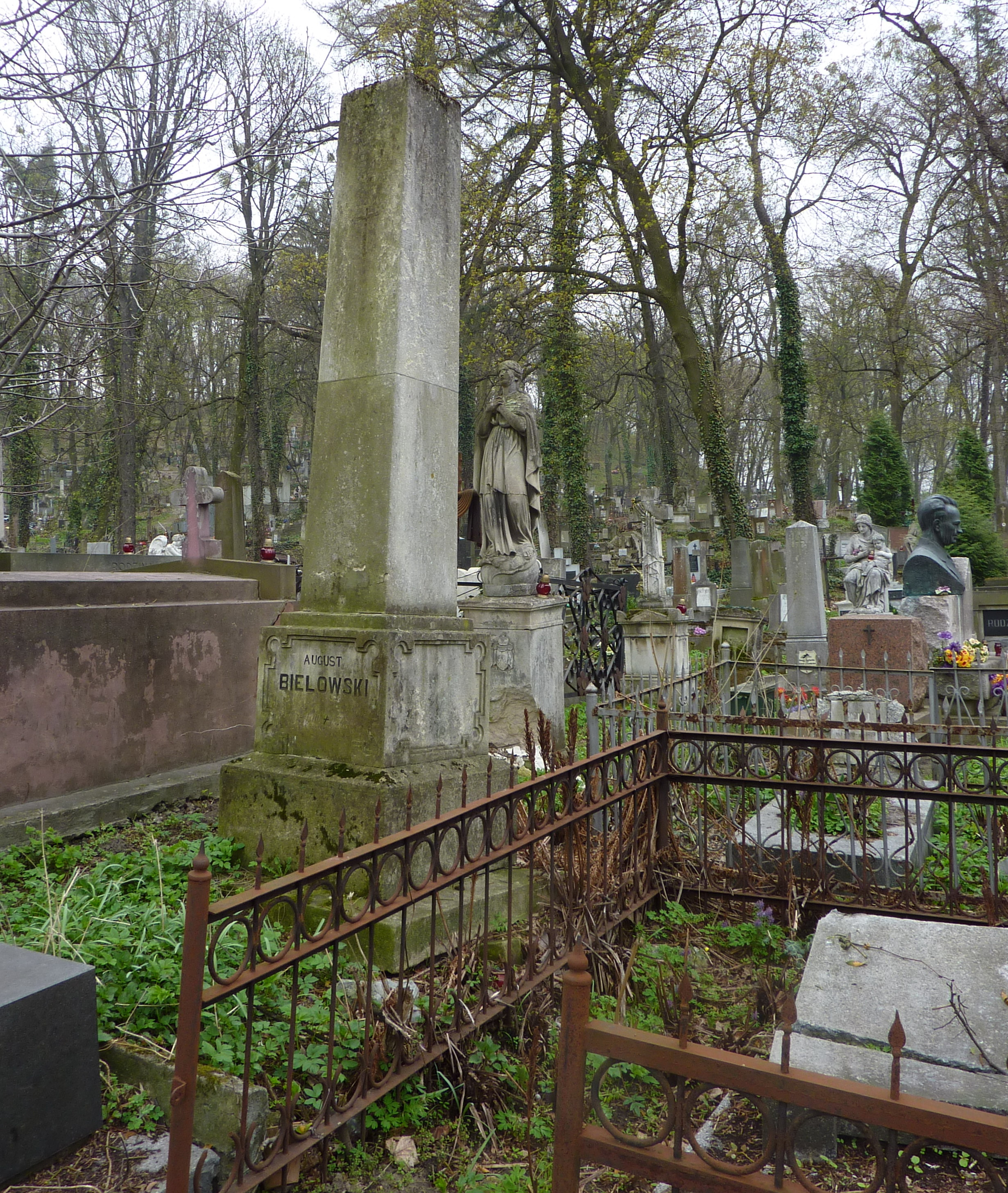 Grób Augusta Bielowskiego na cmentarzu Łyczakowskim